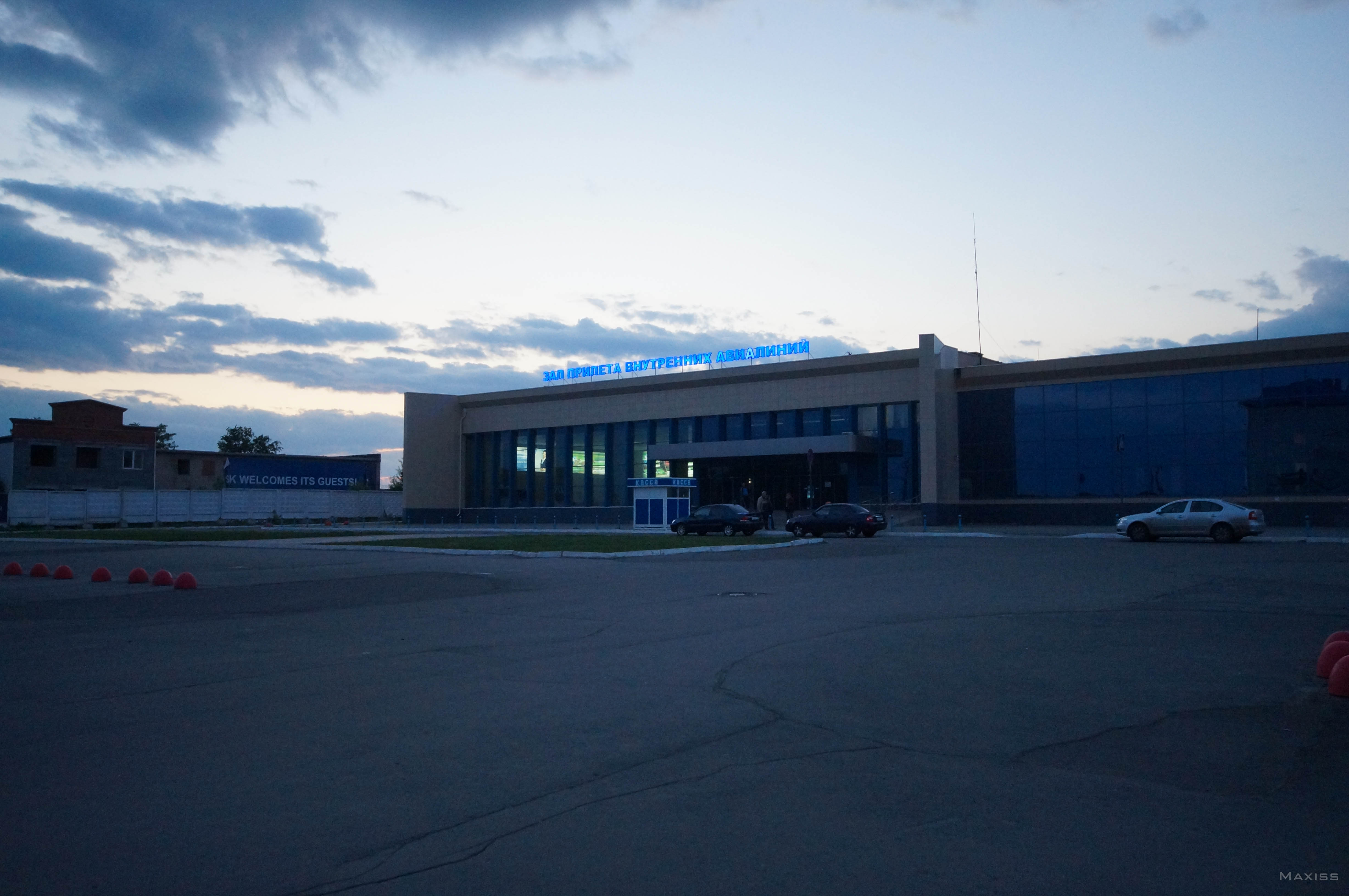 Зал прилета внутренних авиалиний